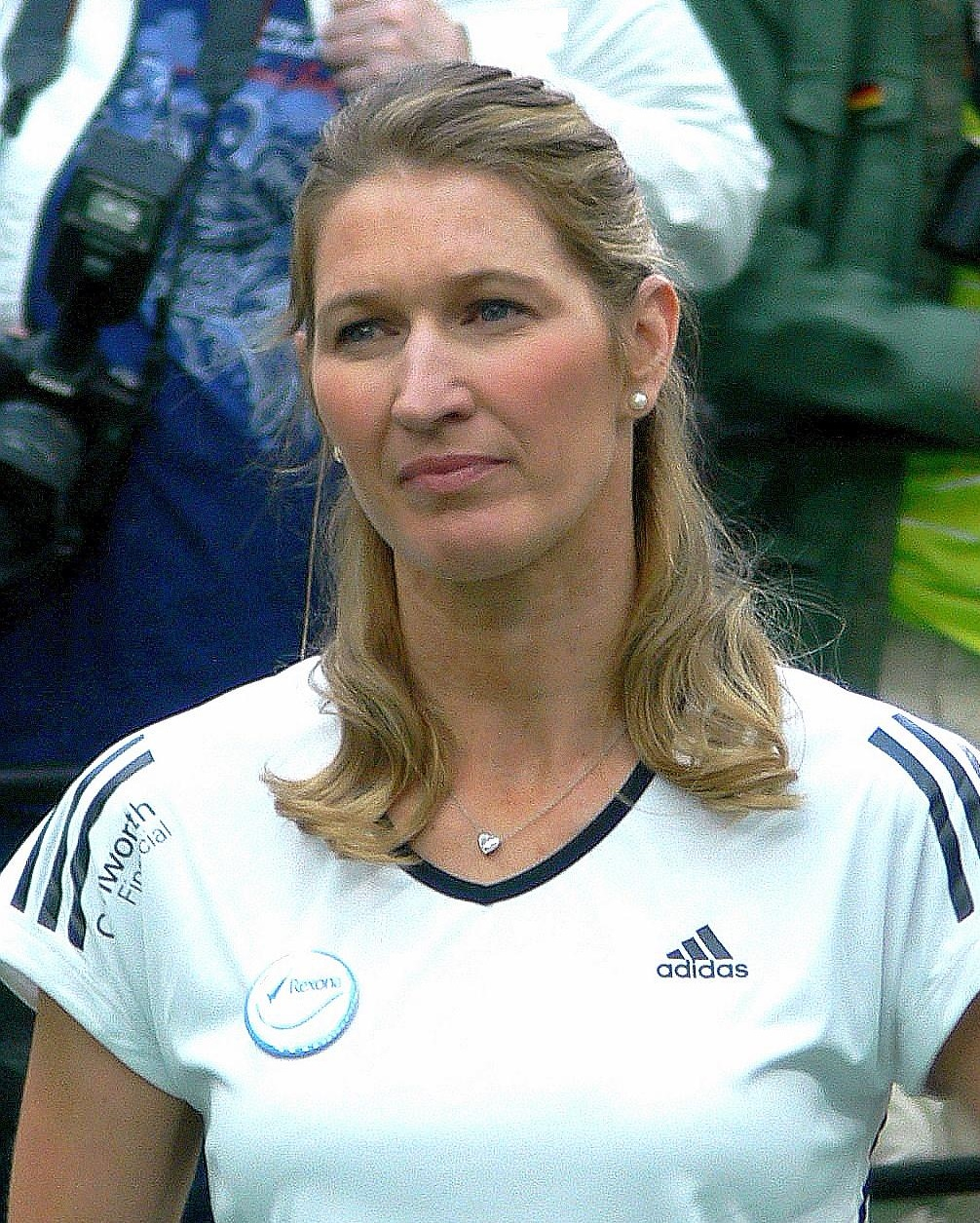 Steffi Graf während eines Charity-Tennis-Turniers für Rexona